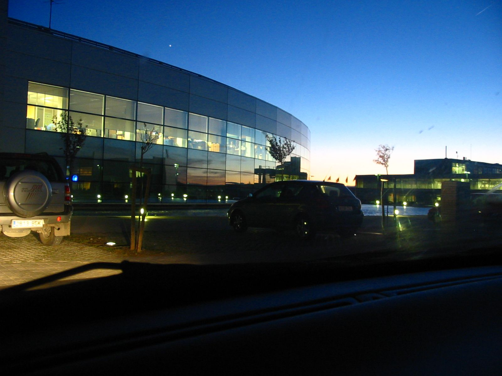 Aragonés: Parque tecnolochico Walqa